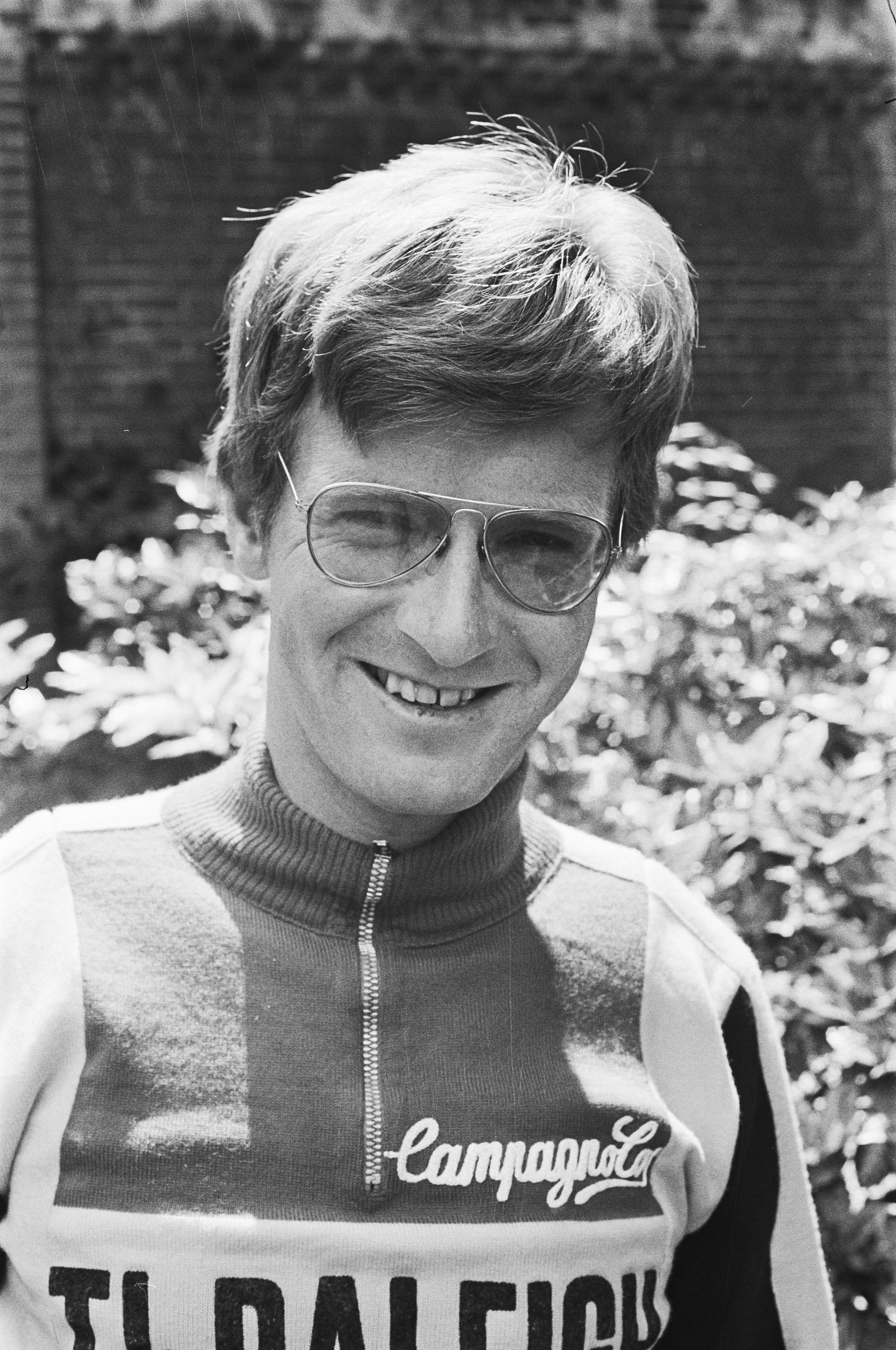 Collectie / Archief : Fotocollectie Anefo Reportage / Serie : [ onbekend ] Beschrijving : Presentatie Nederlandse wielerploegen Raleigh en Frisol die deelnemen aan de Tour de France ; Bert Pronk (Raleigh) Datum : 27 juni 1977 Trefwoorden : portretten, sport, wielrennen Persoonsnaam : Pronk Bert Instellingsnaam : Raleigh Fotograaf : Verhoeff, Bert / Anefo Auteursrechthebbende : Nationaal Archief Materiaalsoort : Negatief (zwart/wit) Nummer archiefinventaris : bekijk toegang 2.24.01.05 Bestanddeelnummer : 929-2451